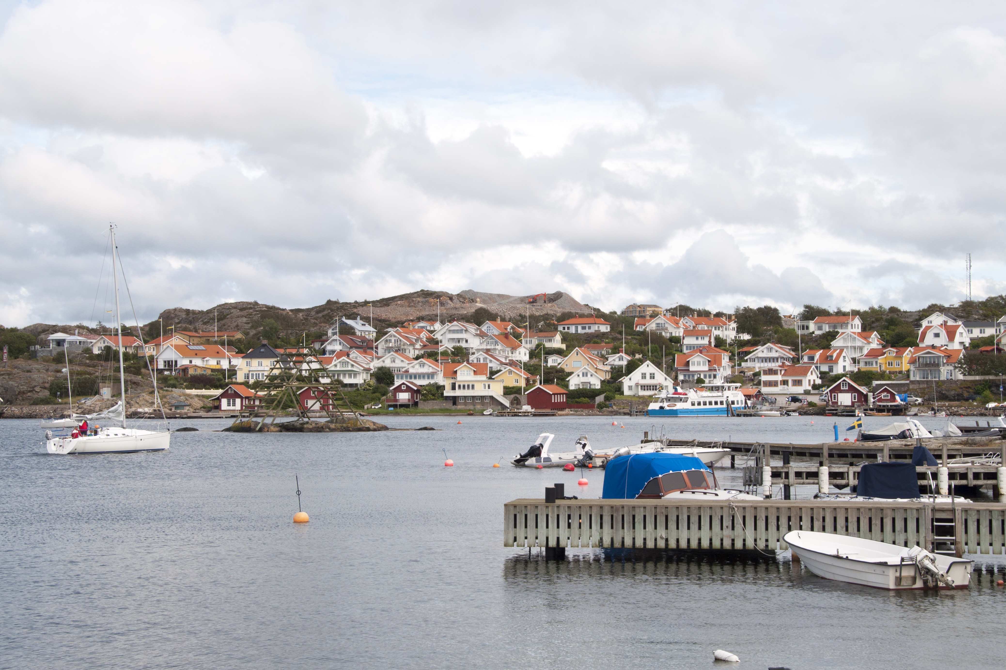 Fiskebäckskil